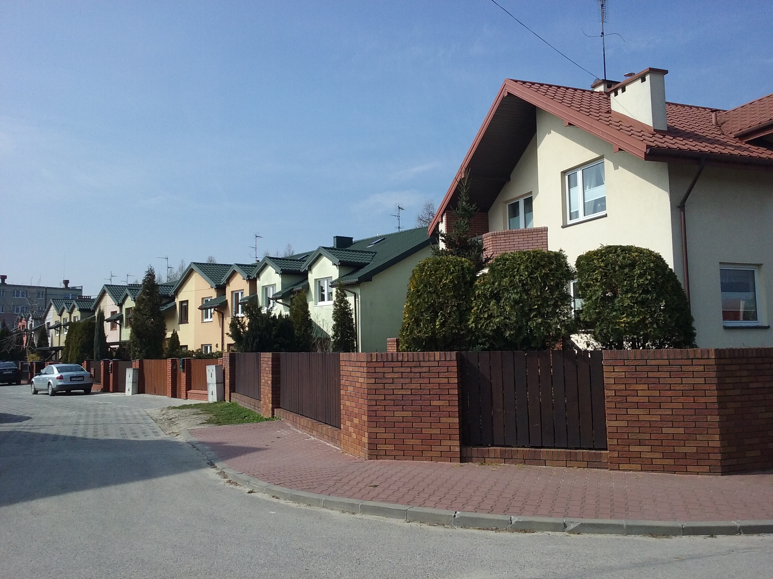 Tomaszów Mazowiecki w województwie łódzkim, PL, EU. Zabudowa jednorodzinna na największym osiedlu mieszkaniowym - Niebrów. CC0